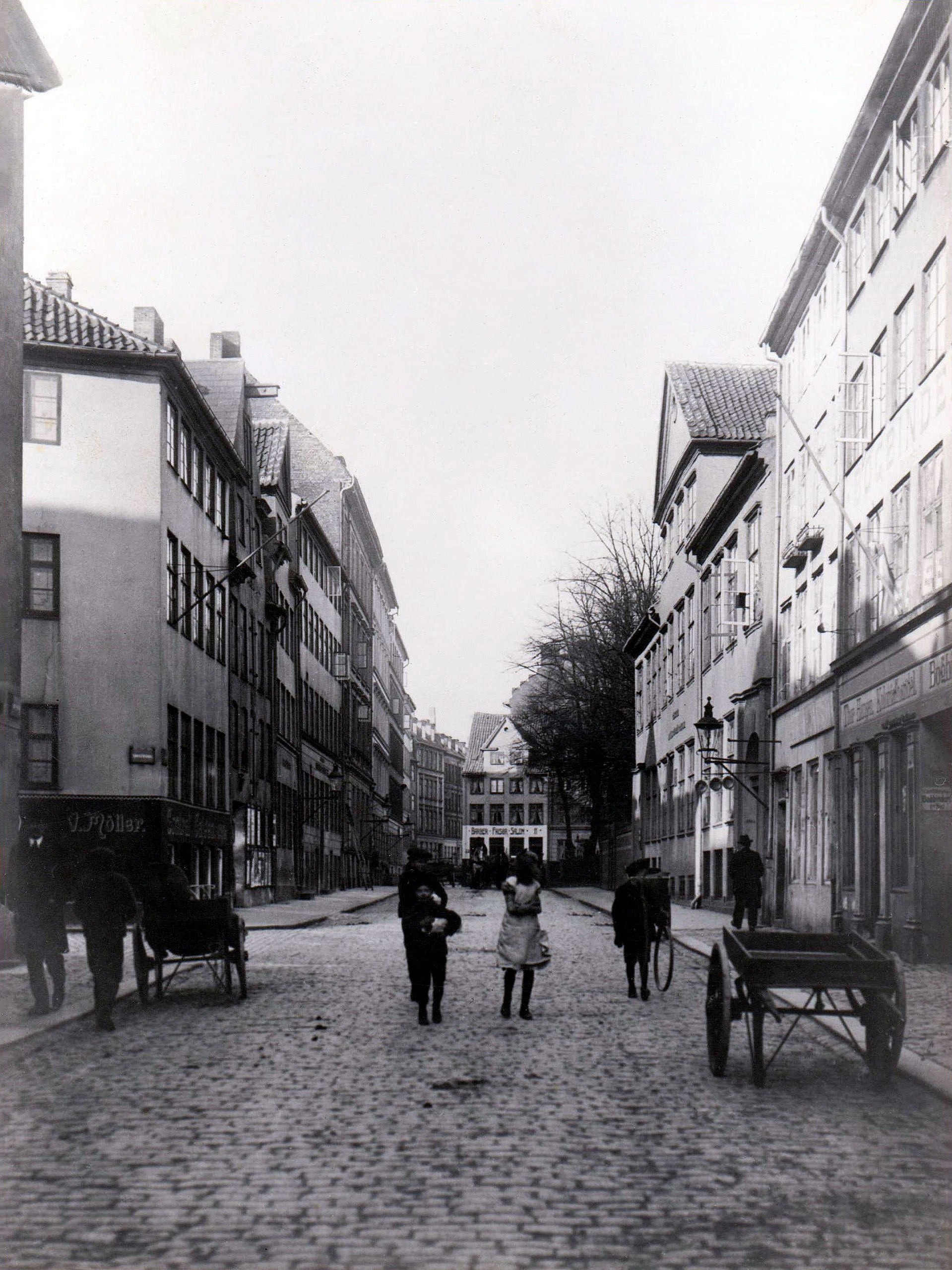 Gaden Aabenraa i Indre København 1913